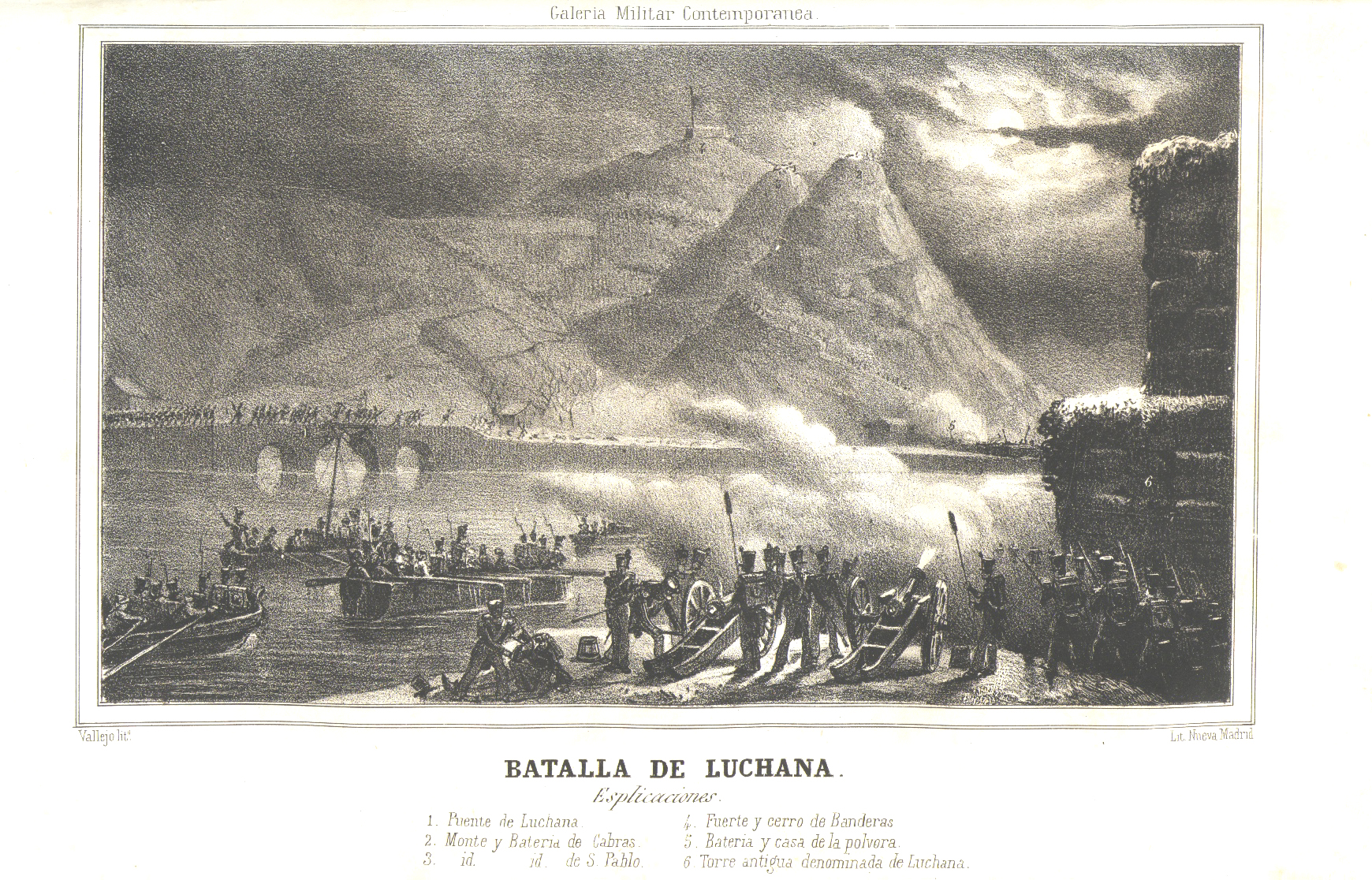 Batalla de Luchana. Diciembre 1836